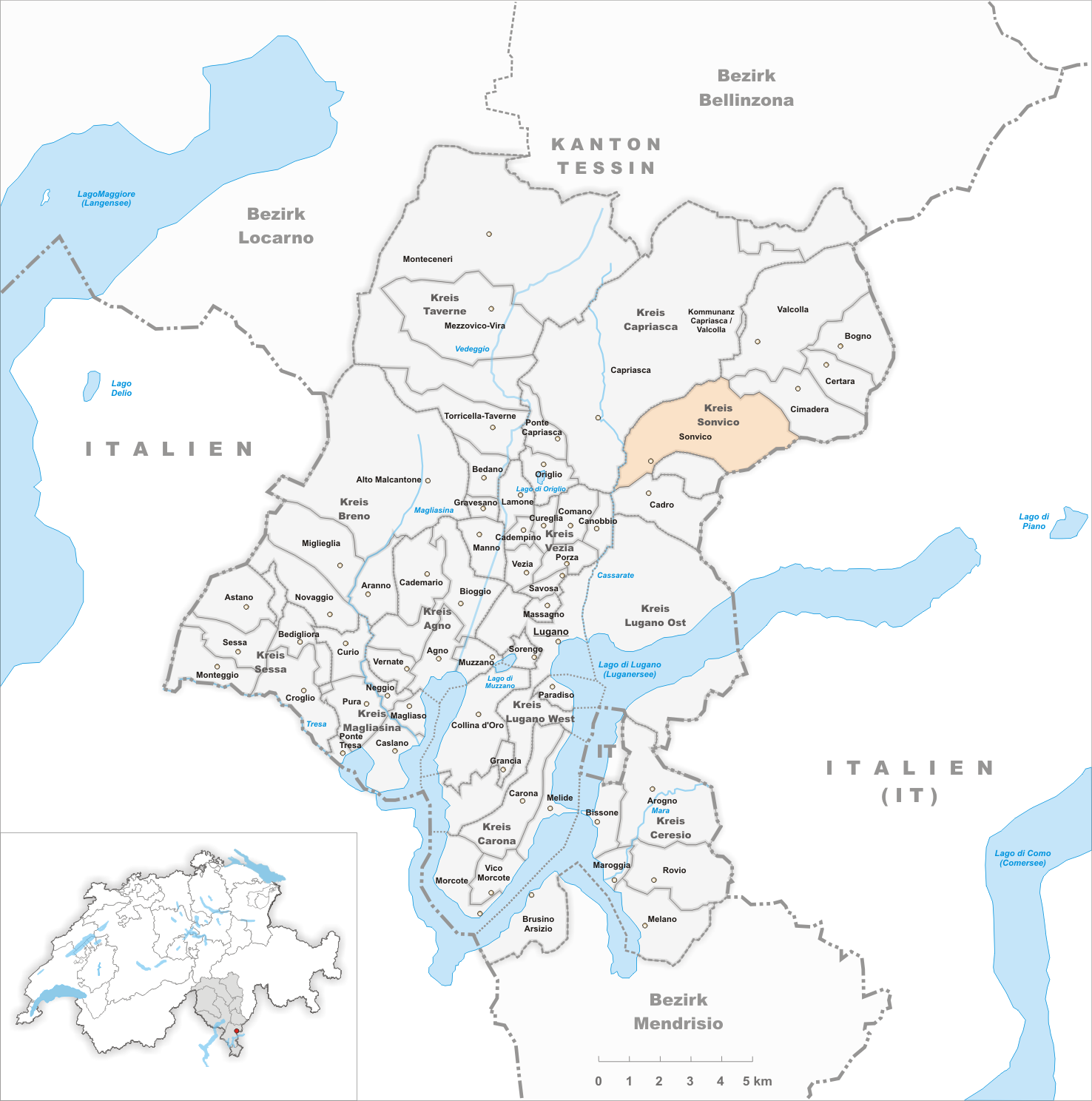 Municipality Sonvico